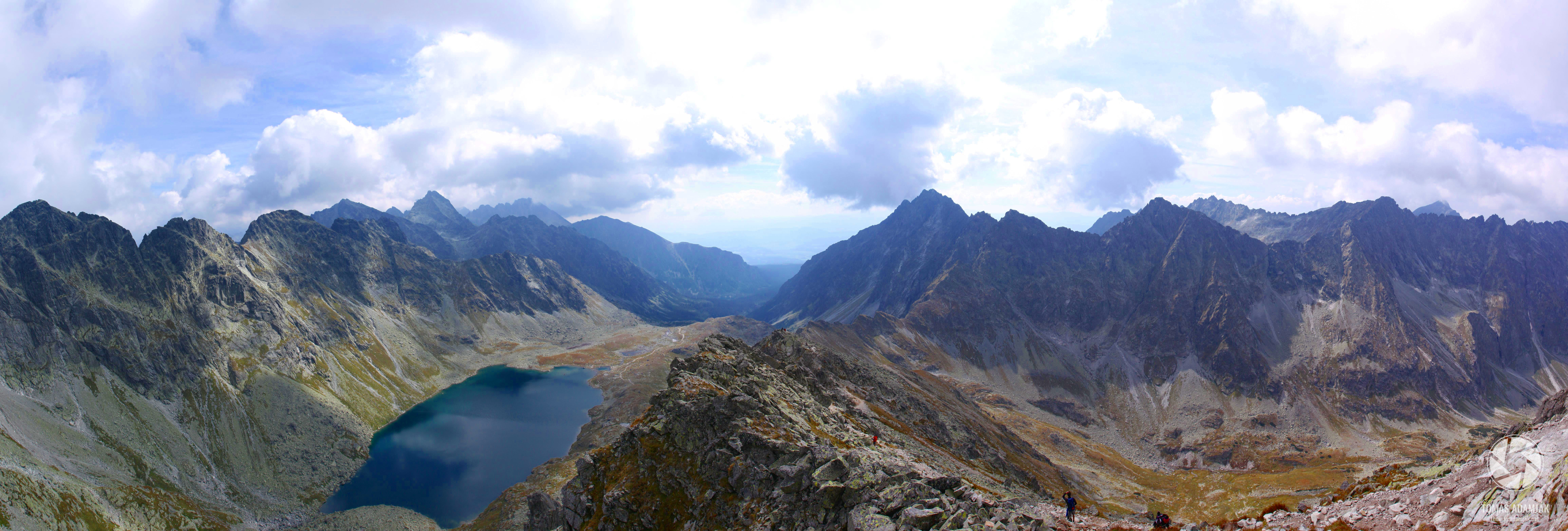 Panorama z Kôprovského štítu smerom na Mengusovskú dolinu